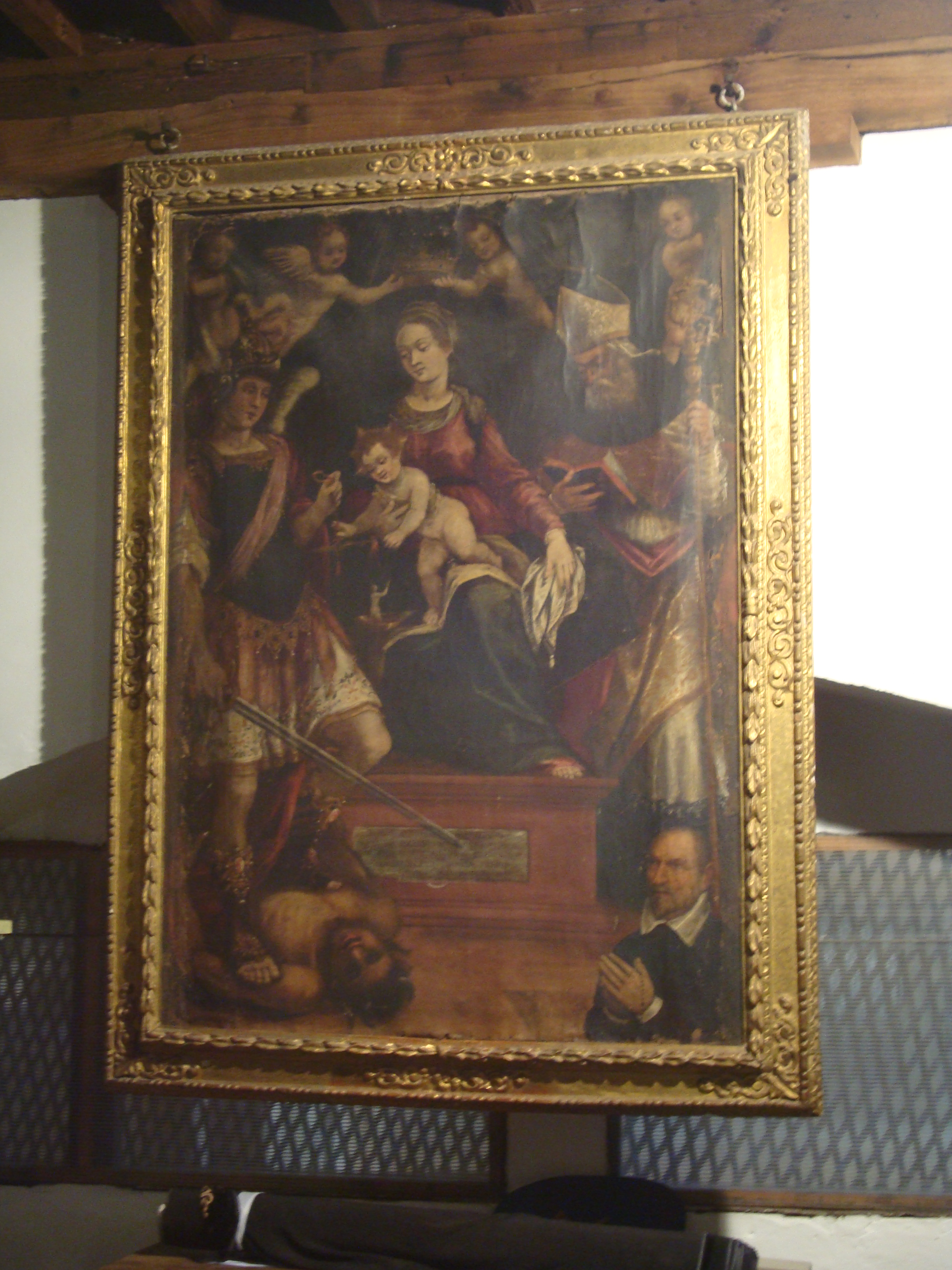 Il dipinto di Brunello Ippoliti (1604)